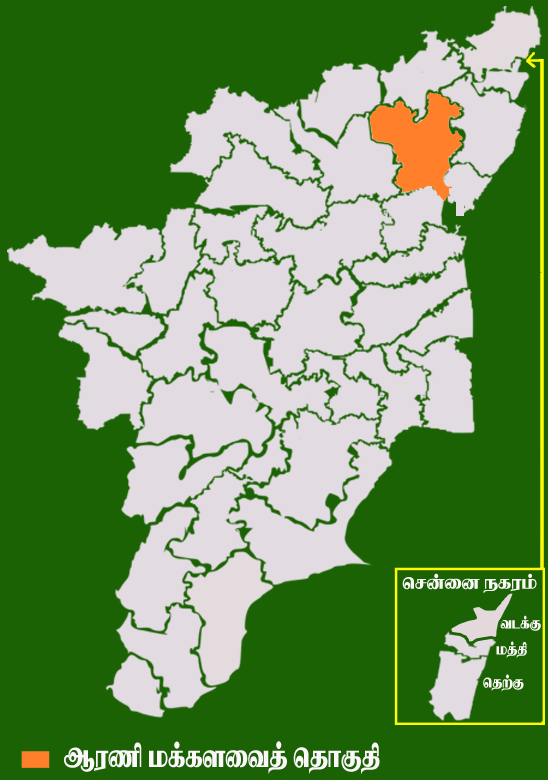 தமிழக வரைபடத்தில் உள்ள ஆரணி மக்களவைத் தொகுதி